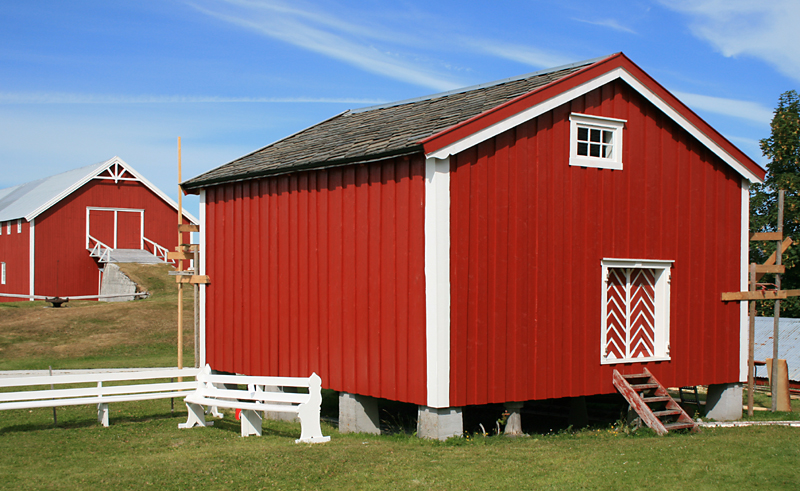 Stabbur, Herøy prestegard, Herøy, Nordland. Freda.